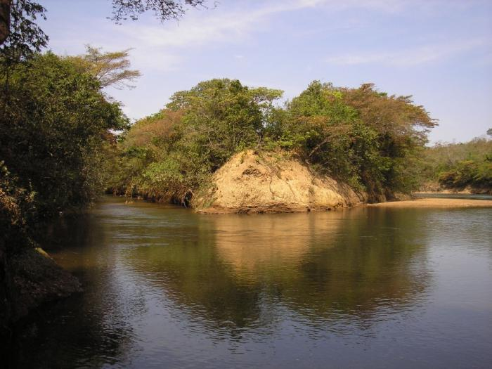 Afluência do Ribeirão Mundo Novo no Rio São Marcos, divisa entre Paracatu (MG) e Cristalina (GO). Foto por Denis Conrado.